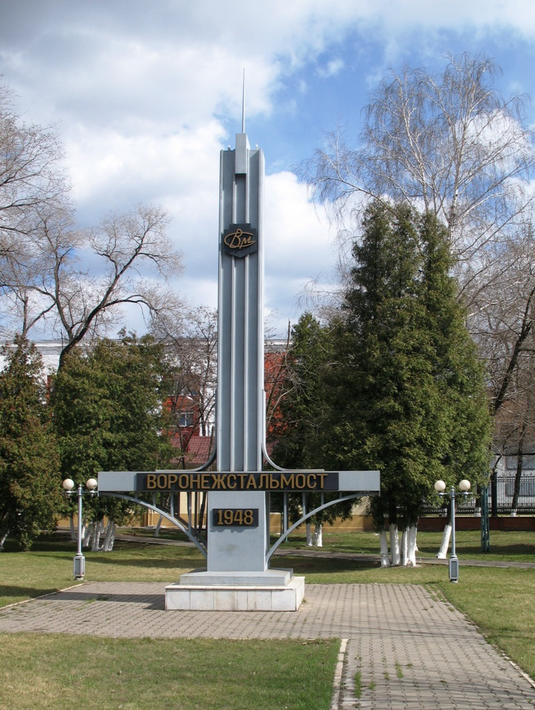 Предприятие "ВоронежСтальМост" (ул. Волгограская, Левобережный район, город Воронеж)